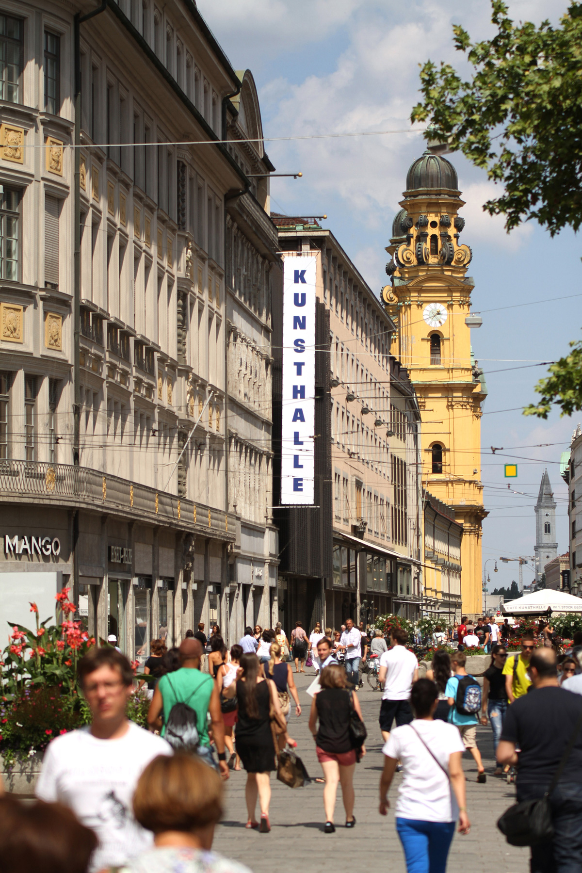 Kunsthalle der Hypo-Kulturstiftung Blick Theatinerstraße